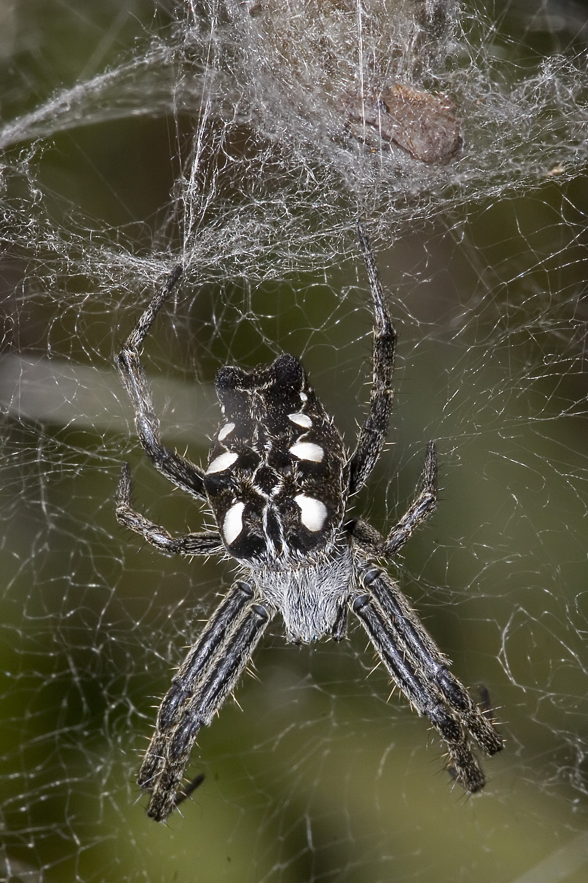 Cyrtophora citricola (Forskäl, 1775)